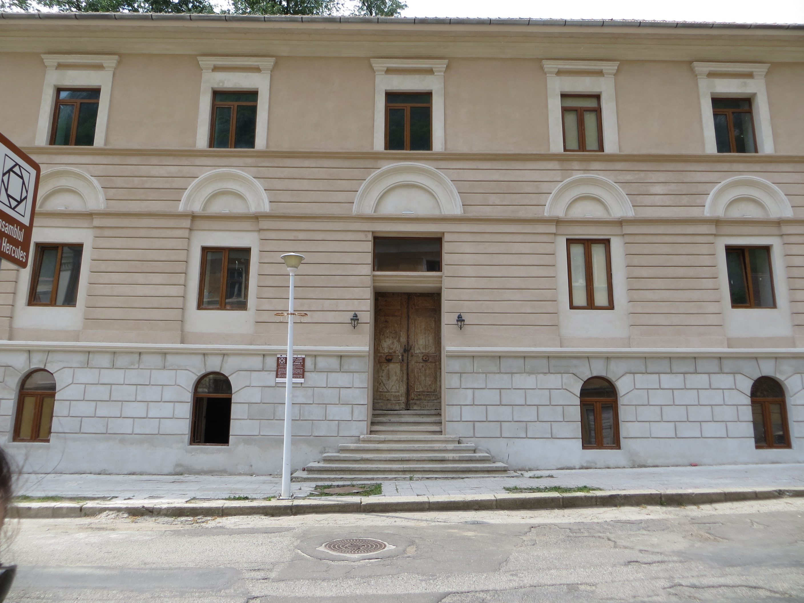 Fost Spitalul pentru trupă și subofițeri, fost Hotel "Domogled" (Pavilionul 5), azi dezafectat